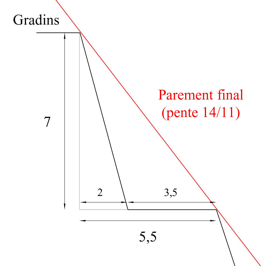 Explication de l'apparition de la pente de 14/11 utilisée à Meïdoum